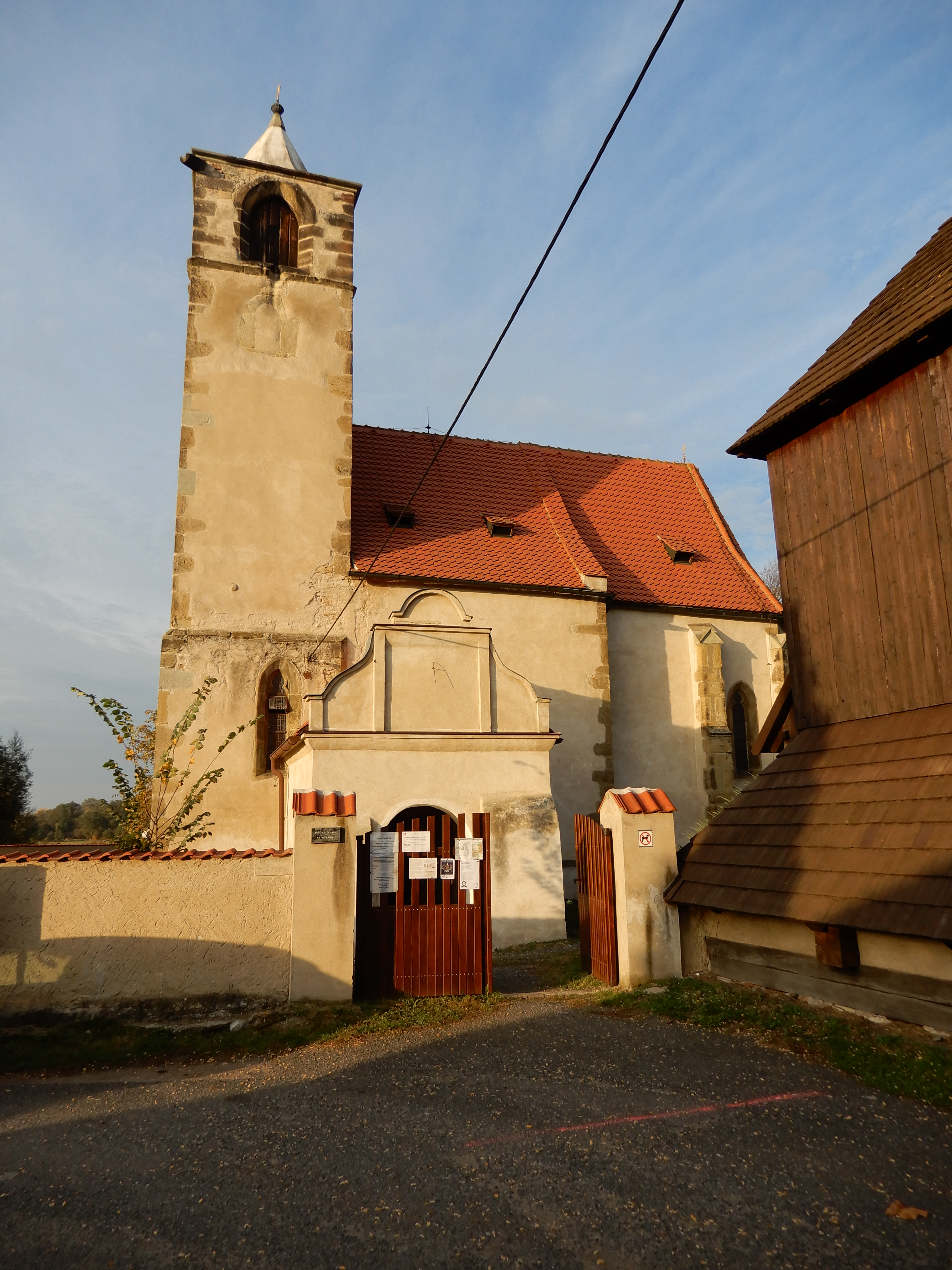 Kostel sv. Jakuba Většího od jihu, Libiš